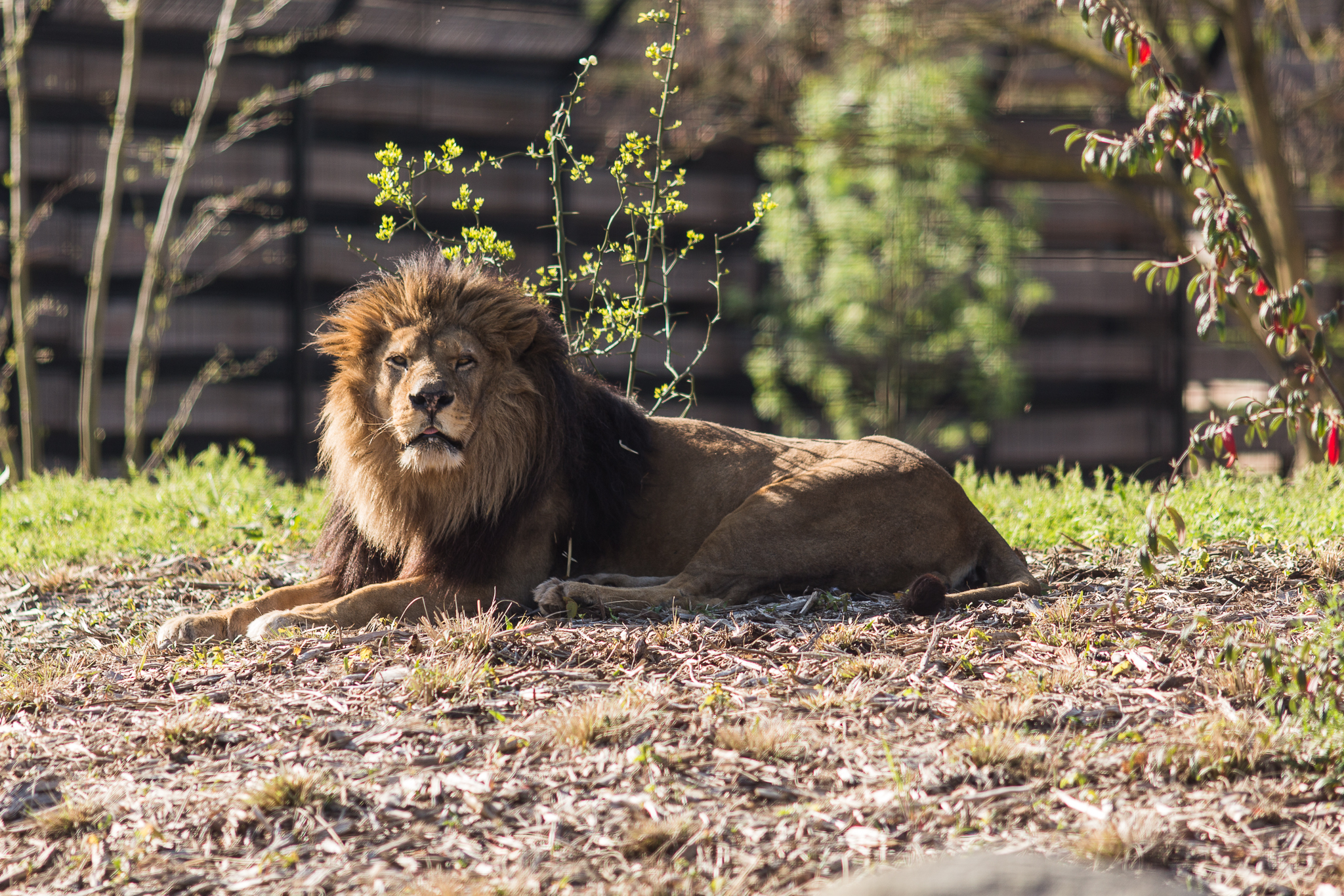 Parc Zoologique de Paris, France.